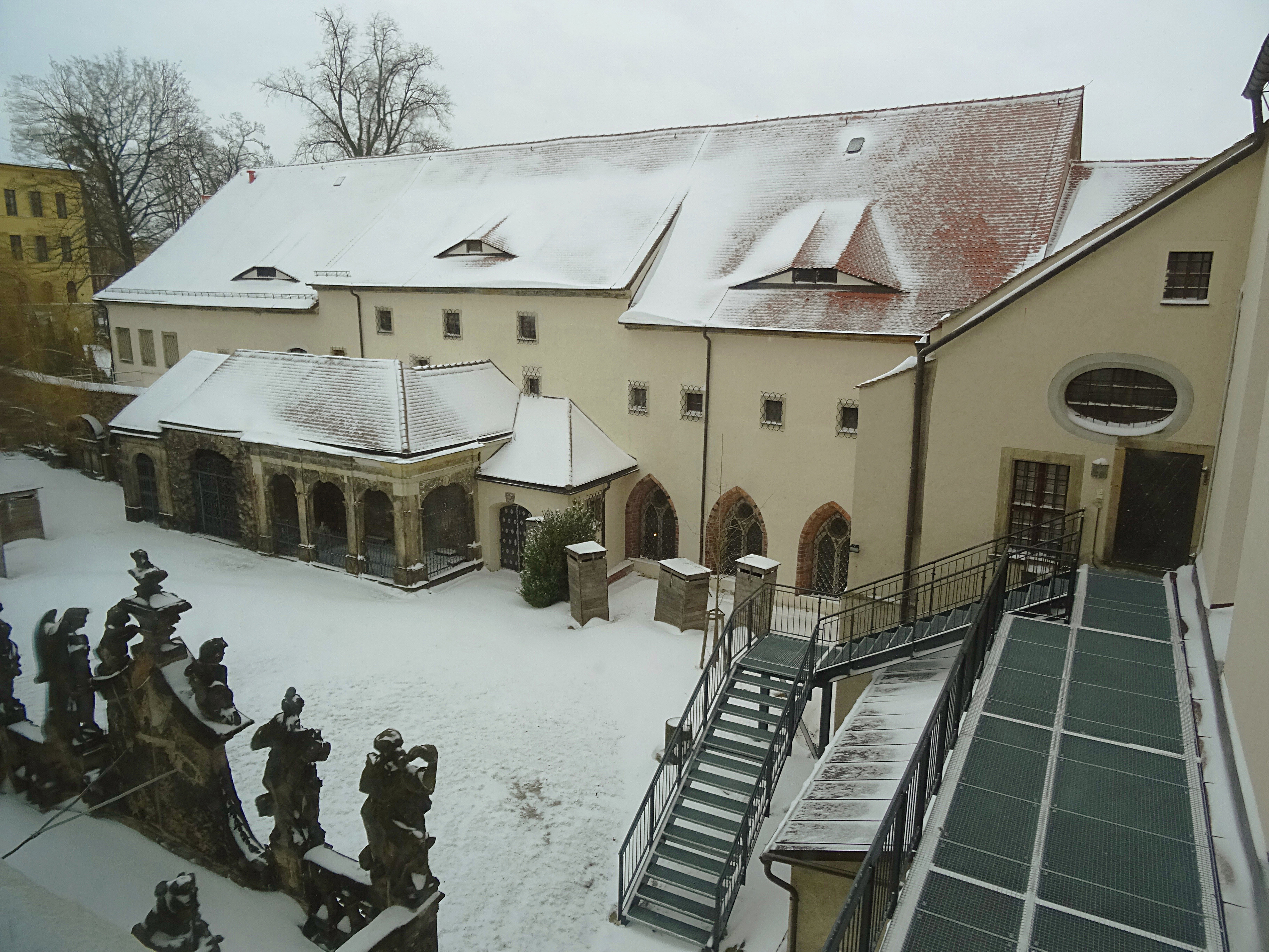 Klosterhof des ehemaligen Franziskanerklosters (1268)